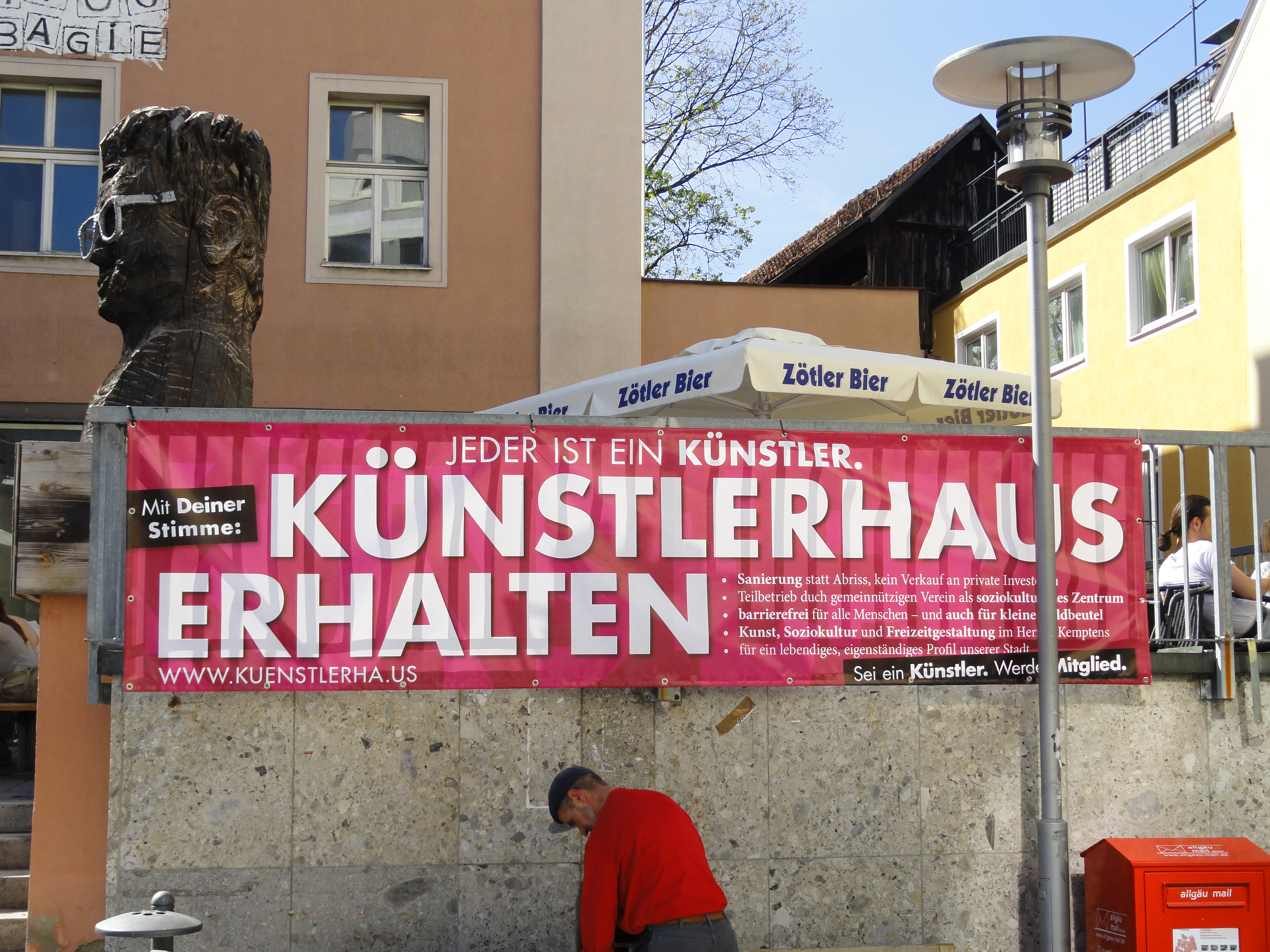 Plakat des Unterstützervereins Künstlerhaus e.V. in der Fußgängerzone (Fischerstraße) in Kempten